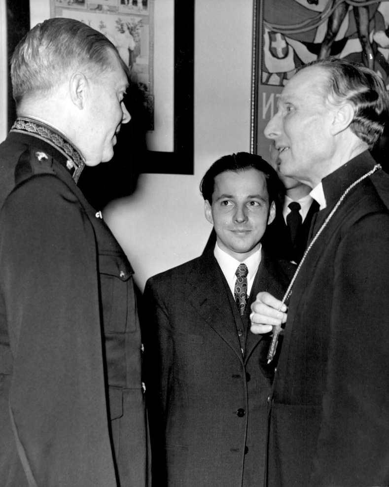 Biskop Björkquist i samspråk med polismästare Roos och (i mitten) dirigenten för polissångkören Uno Sandén vid Korum i Polishuset på Kungsholmen.